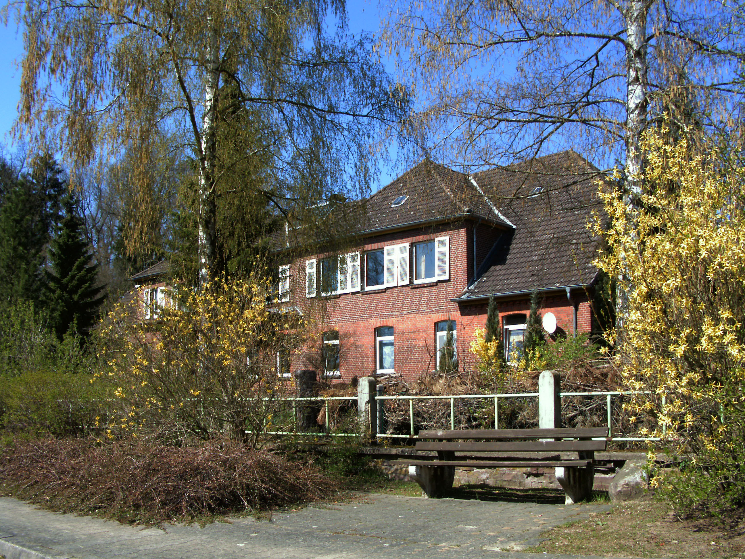 Haus Maria Rast in Holxen, Landkreis Uelzen